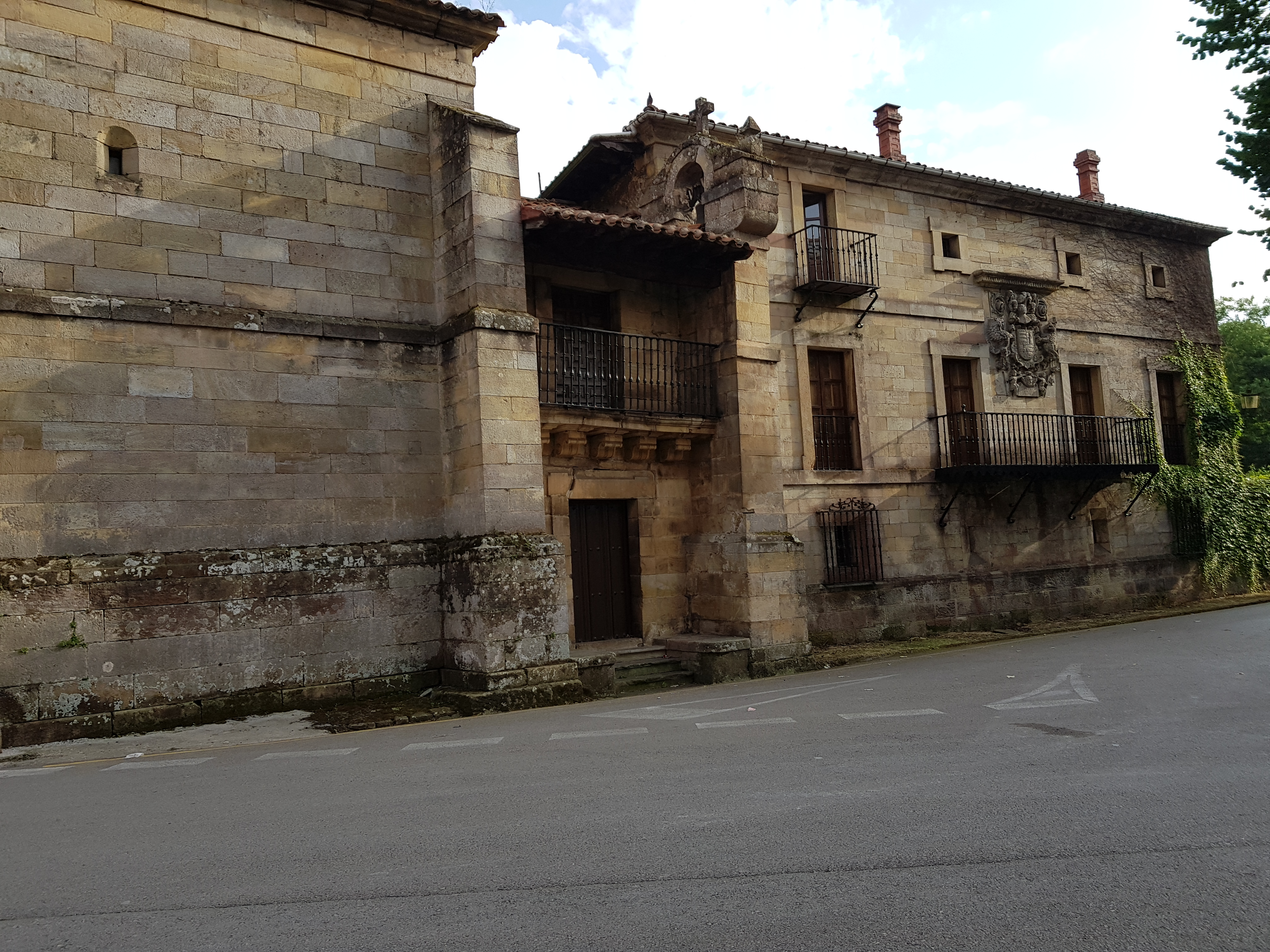 Vista de la fachada principal de la casona.